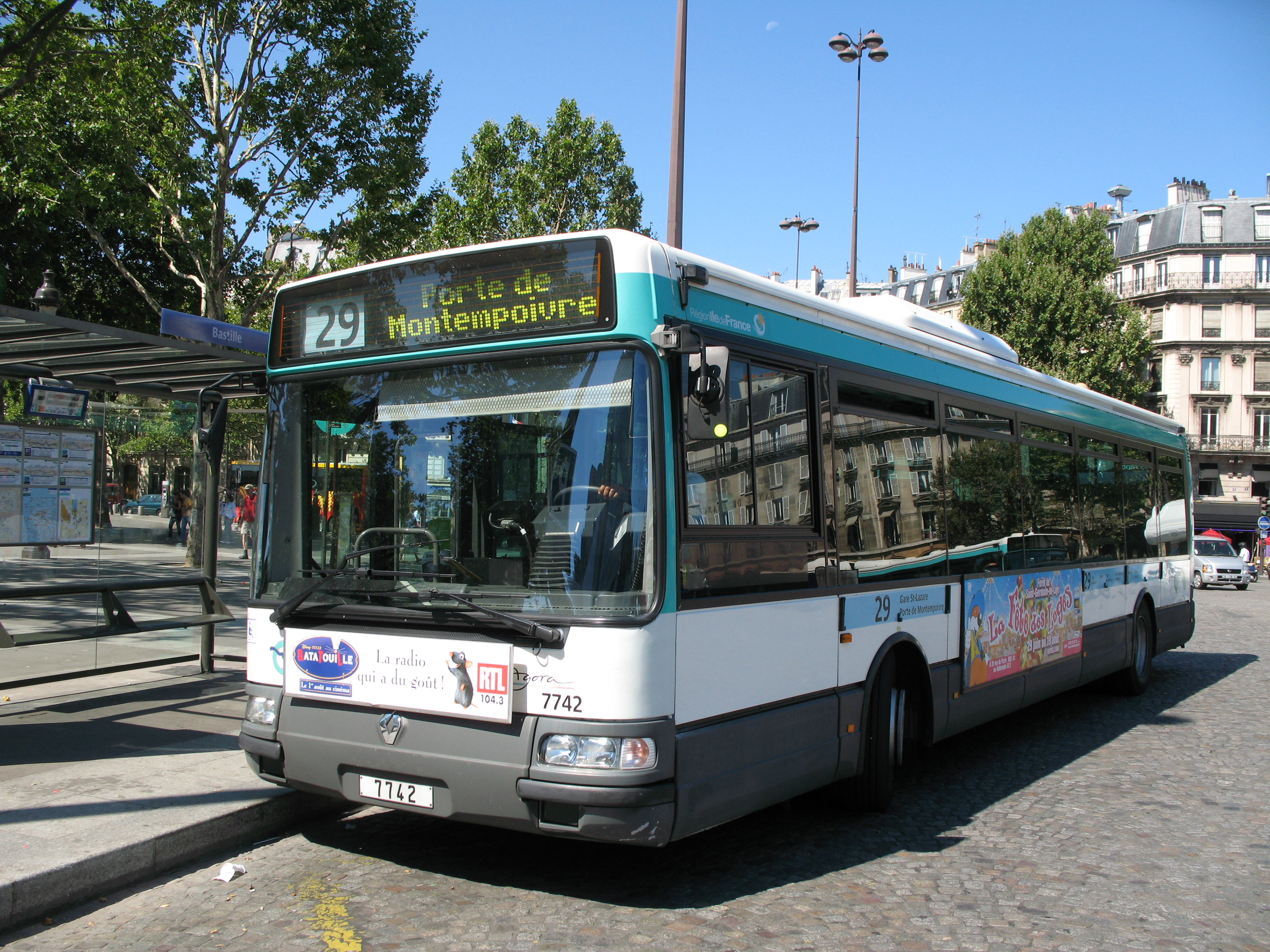 Un bus RATP sur la ligne 29 à la Bastille_Paris_France.